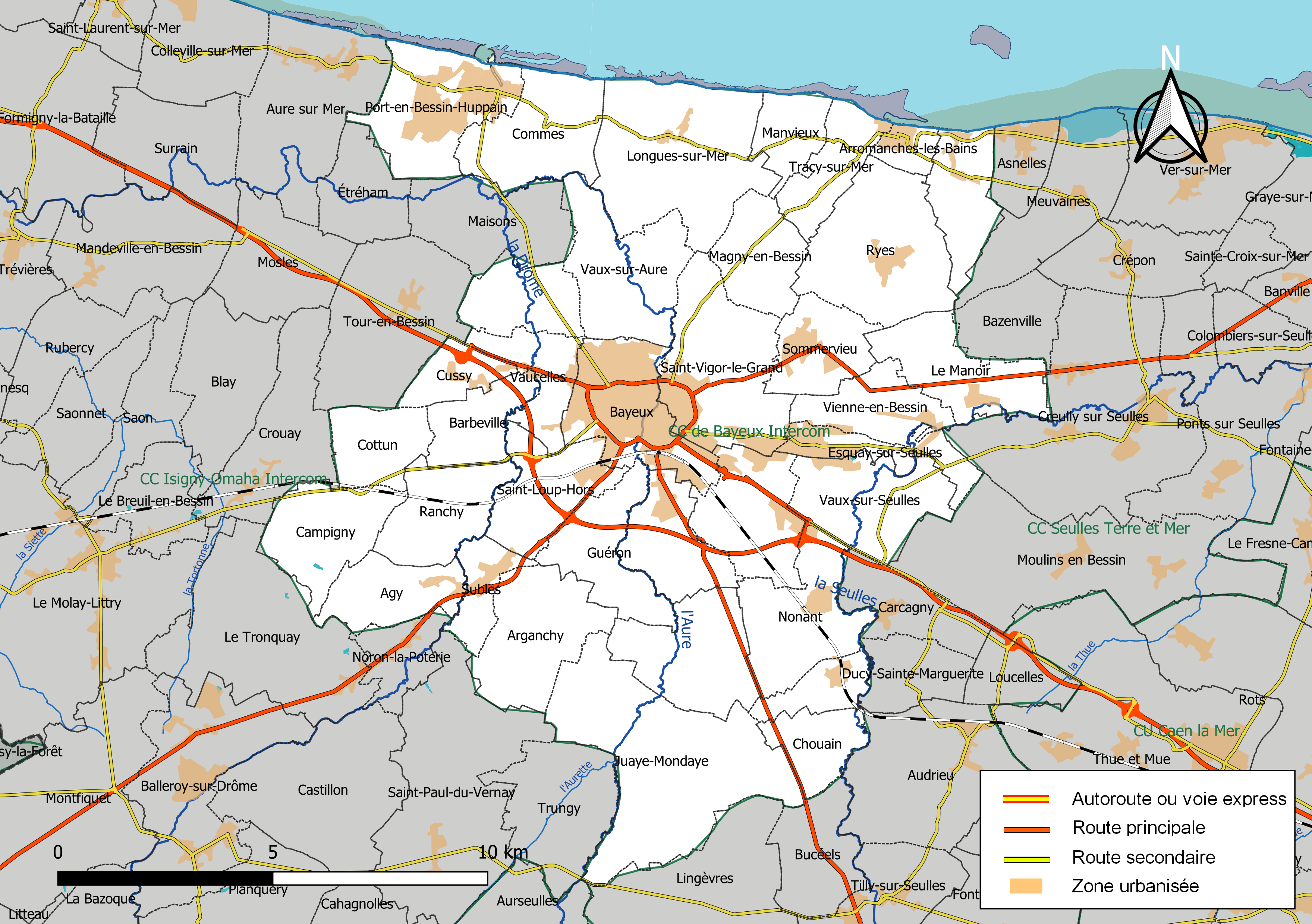 Carte géographique de la Communauté de communes de Bayeux Intercom, département du Calvados, France. Composition au 1er janvier 2019.